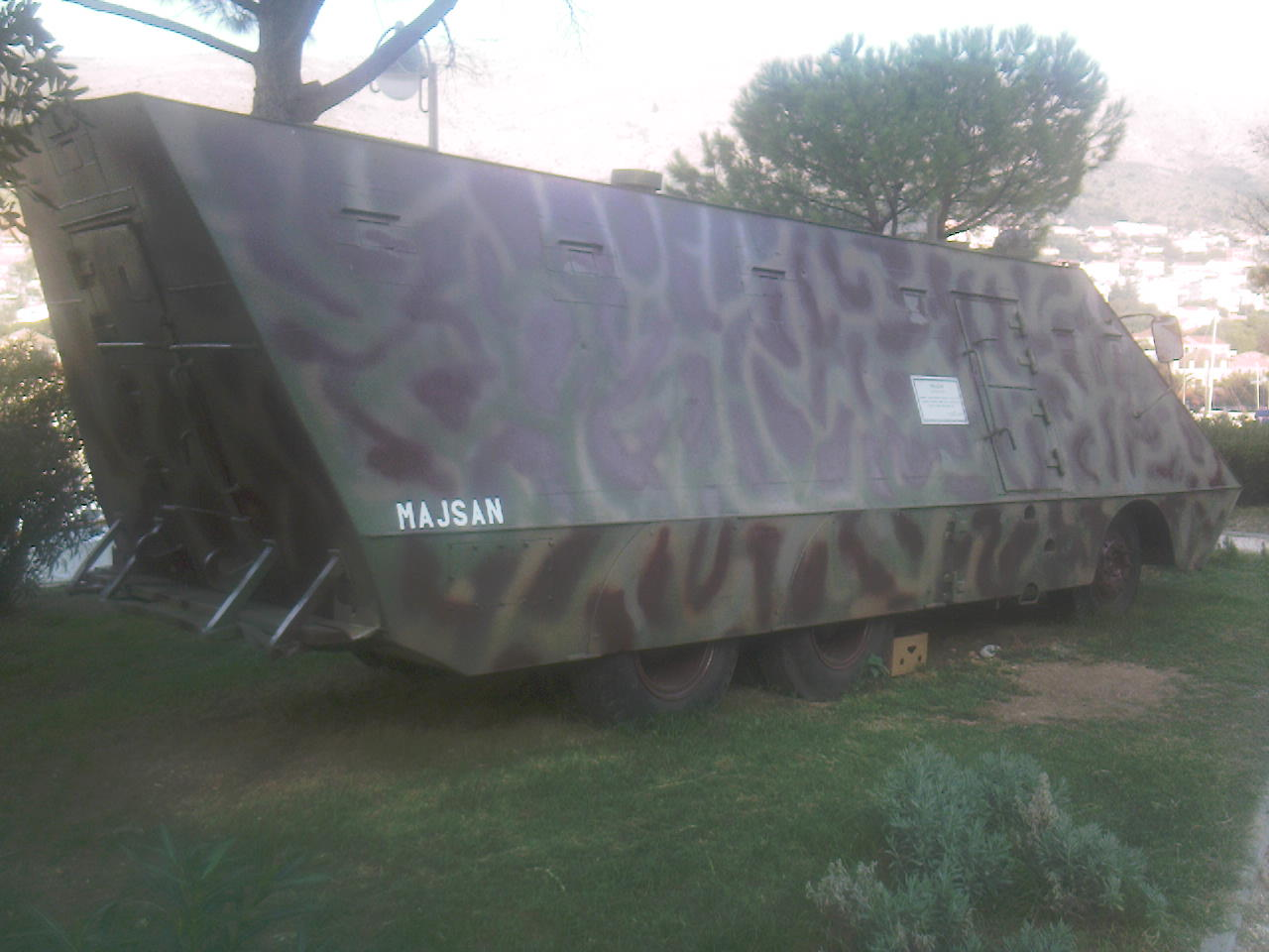 Majsan s boka